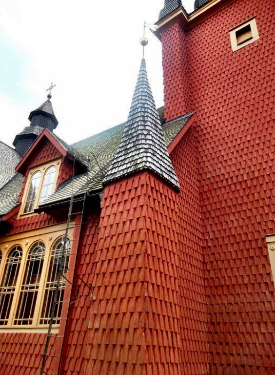 Ljusnarsberg's Church